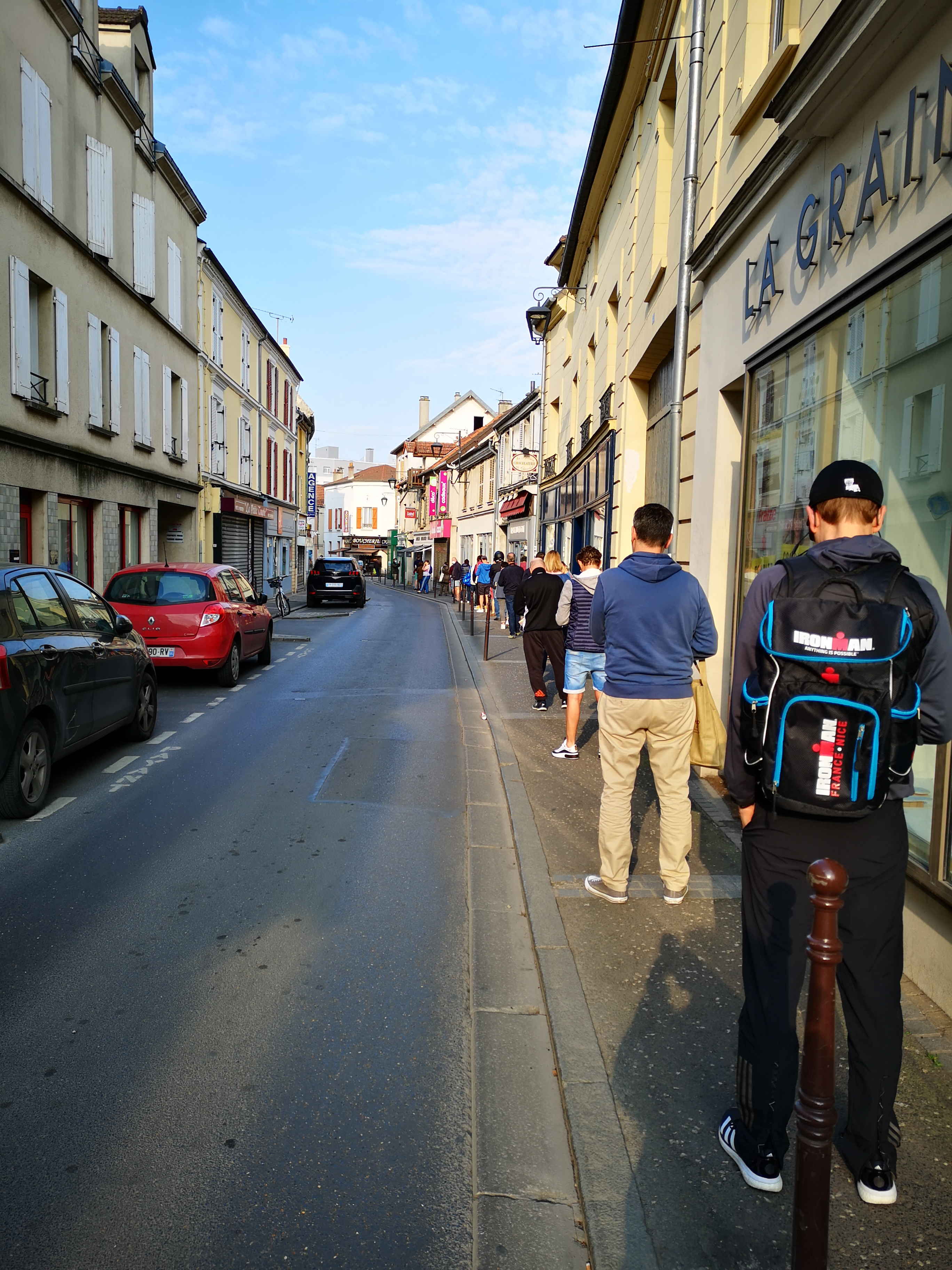 Files d'attente dans une ville d'Ile-de-France devant des commerces- provoquée par les règles de distanciation physique en raison de la pandémie du Covid-19 . C'est mi-avril 2020, pendant la période de confinement : les commerces ouverts (essentiellement les commerces alimentaires) se trouvent, dans cette rue, du même côté...